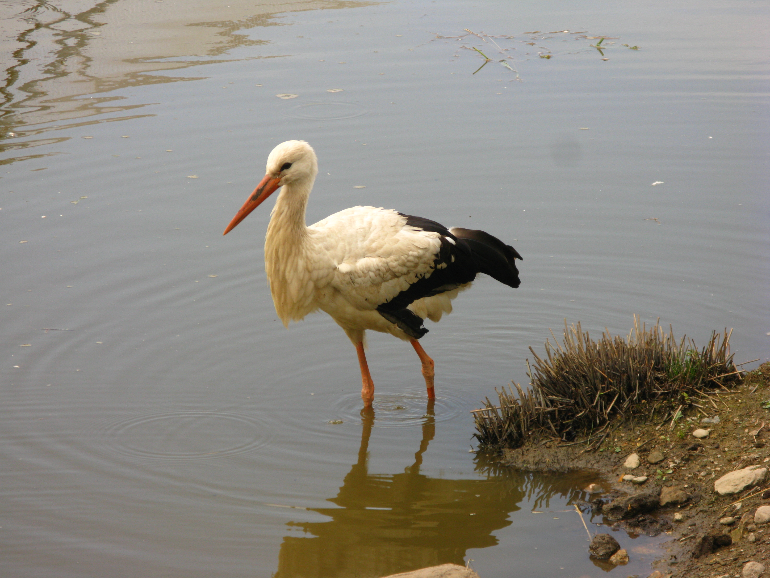 Белый аист (Ciconia ciconia) в зоопарке города Гродно, Беларусь.